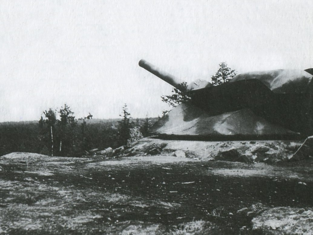 Batteri Järflotta i Stockholms skärgård